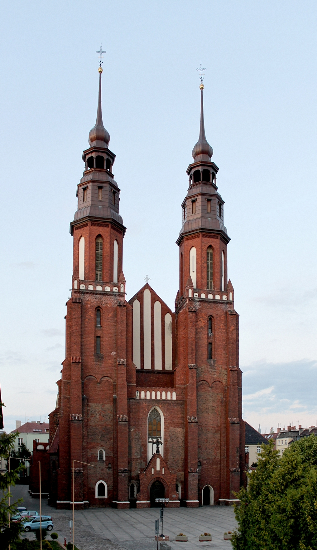 Widok z placy przedwejściowego do katedry